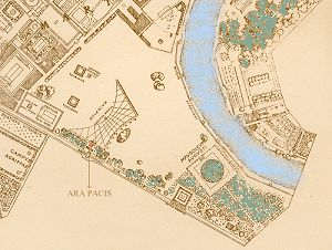 Horologium et ara pacis sur un plan de Paul Bigot (1870-1942)